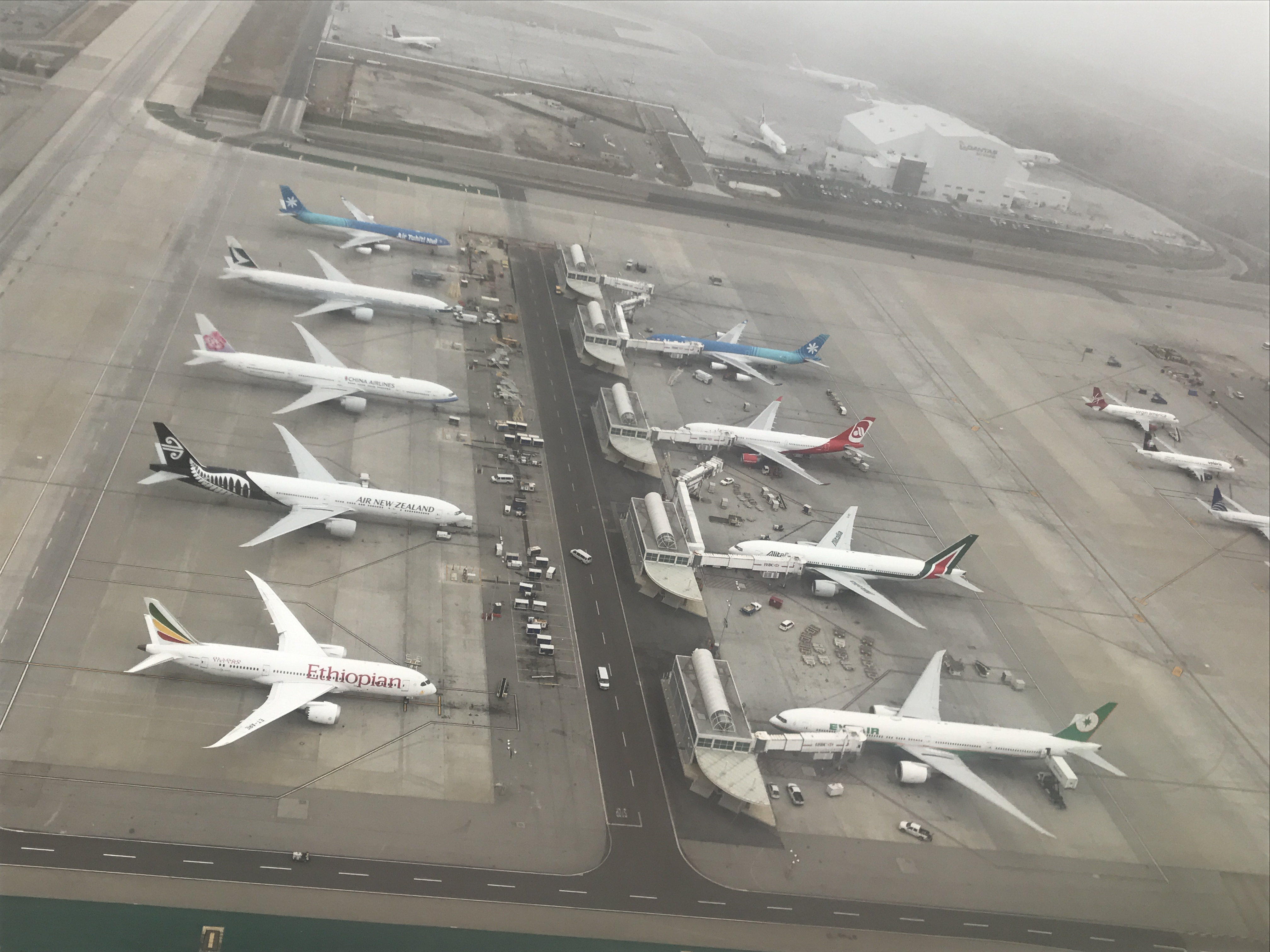 Vista aérea del aeropuerto de Los Ángeles